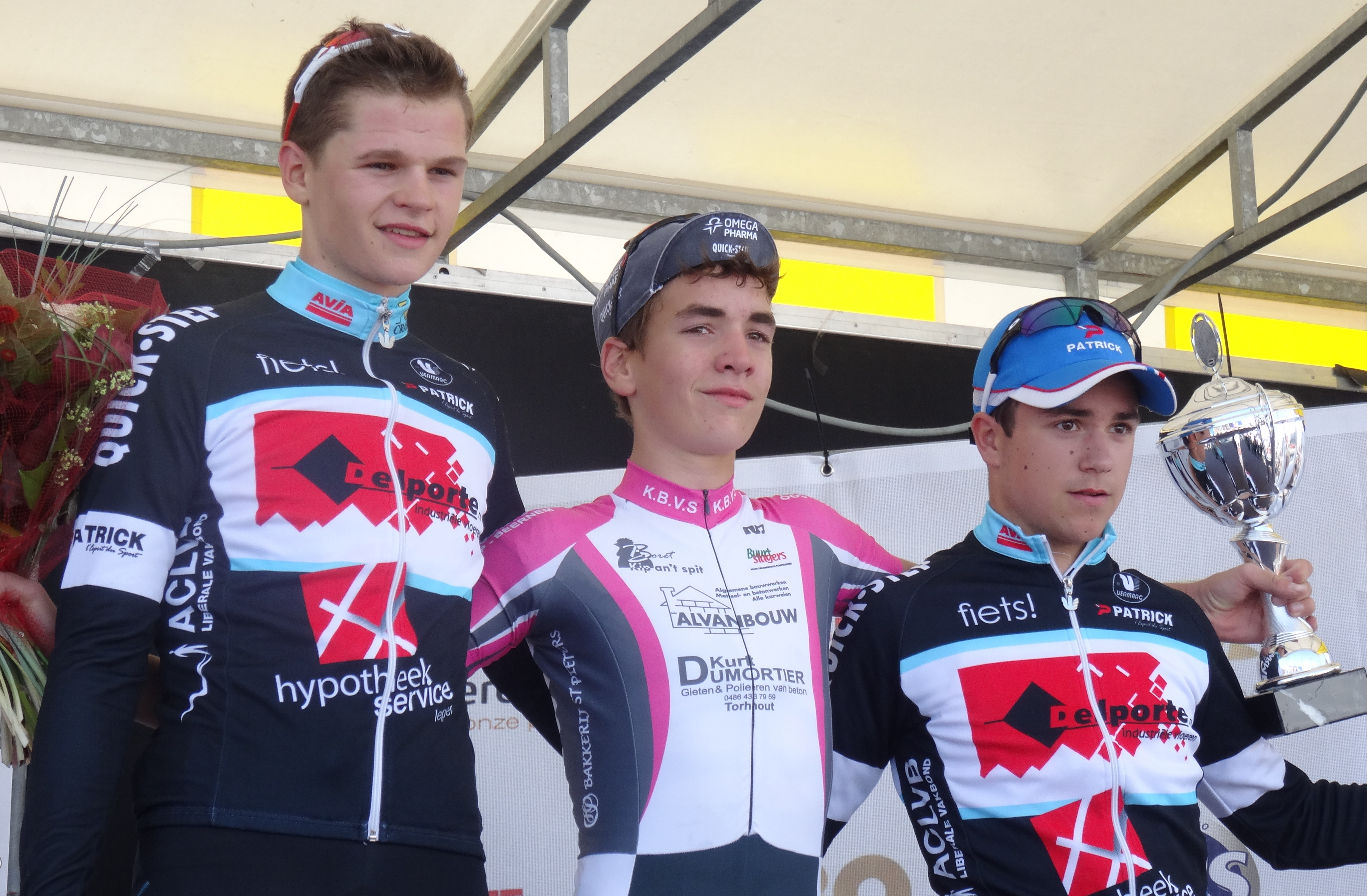 Reportage photographique réalisé le samedi 13 septembre à l'occasion du départ et de l'arrivée de la Flèche côtière 2014 à Heist (Knokke-Heist), Belgique.